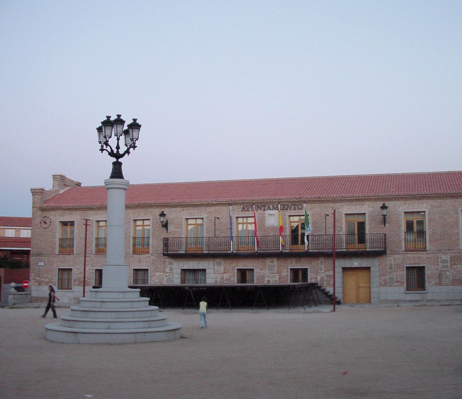 Ayuntamiento de Navas del Rey.